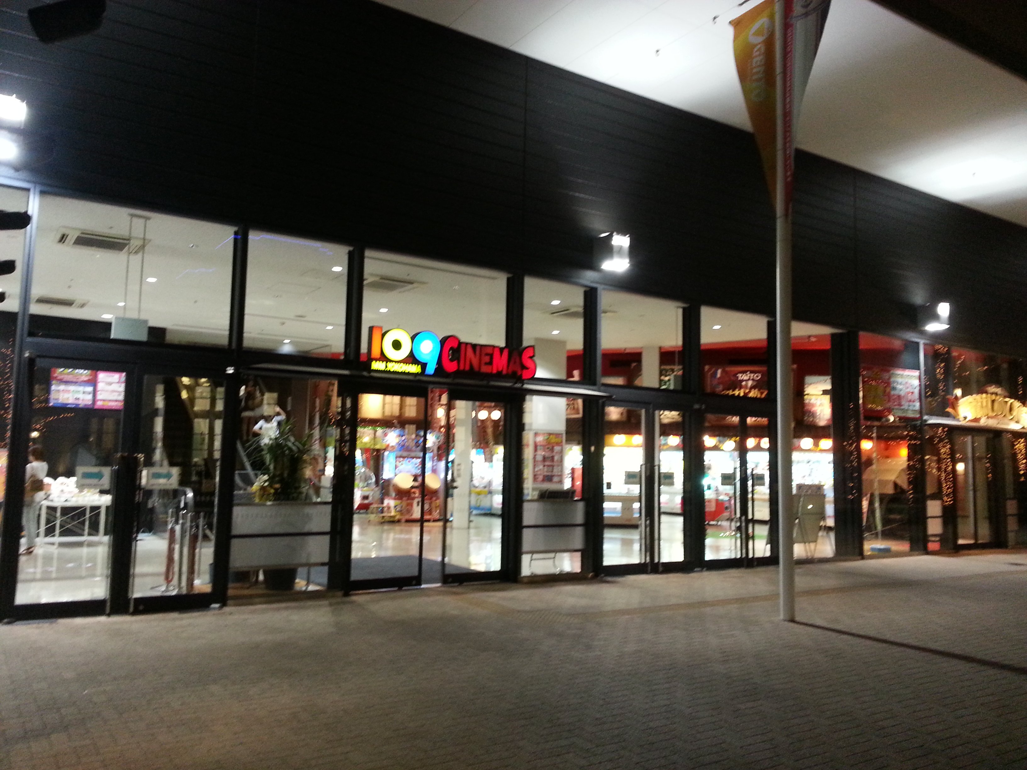 ゲントヨコハマの歩行者導線側出入り口。